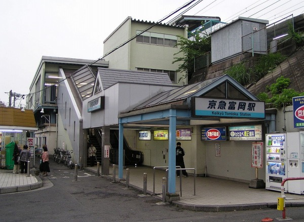 京急富岡駅東口（神奈川県横浜市） 2006年5月2日午後3時30分 (JST) ごろ投稿者が撮影。